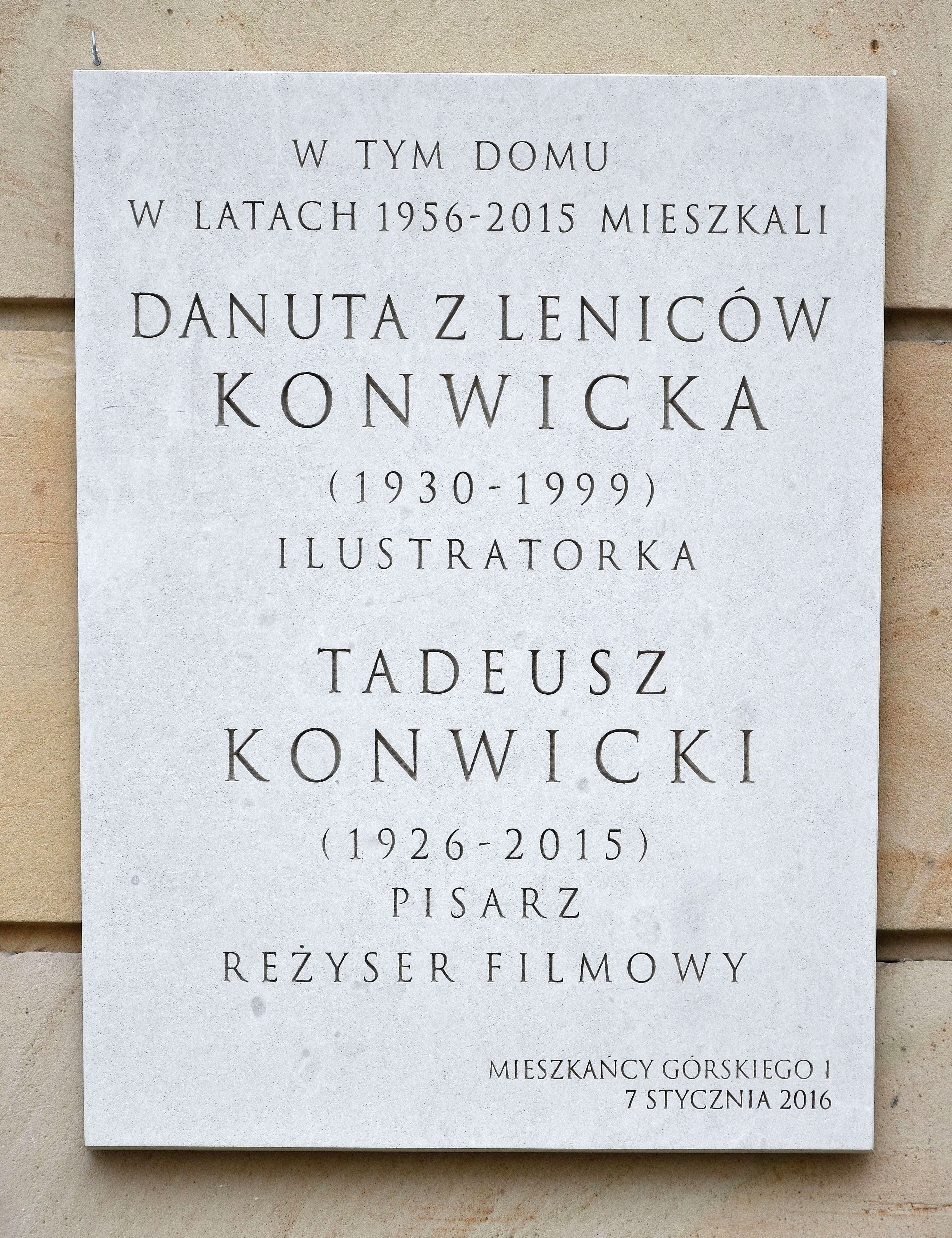 Tablica upamiętniająca Danutę Konwicką i Tadeusza Konwickiego przy ul. Górskiego 1 w Warszawie